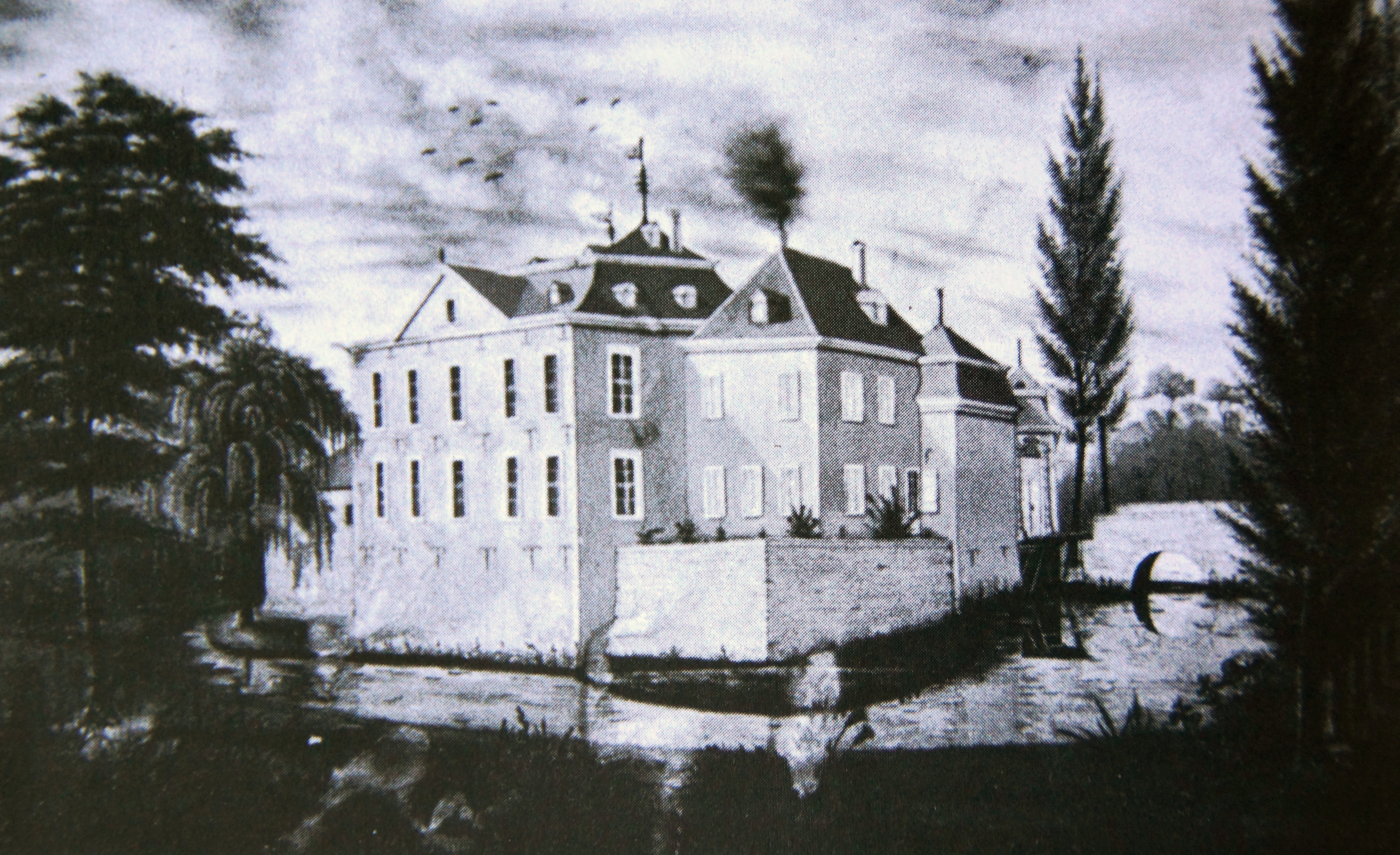 Haus Bitz, nach der Natur gezeichnet von Duplan, 1820-1830